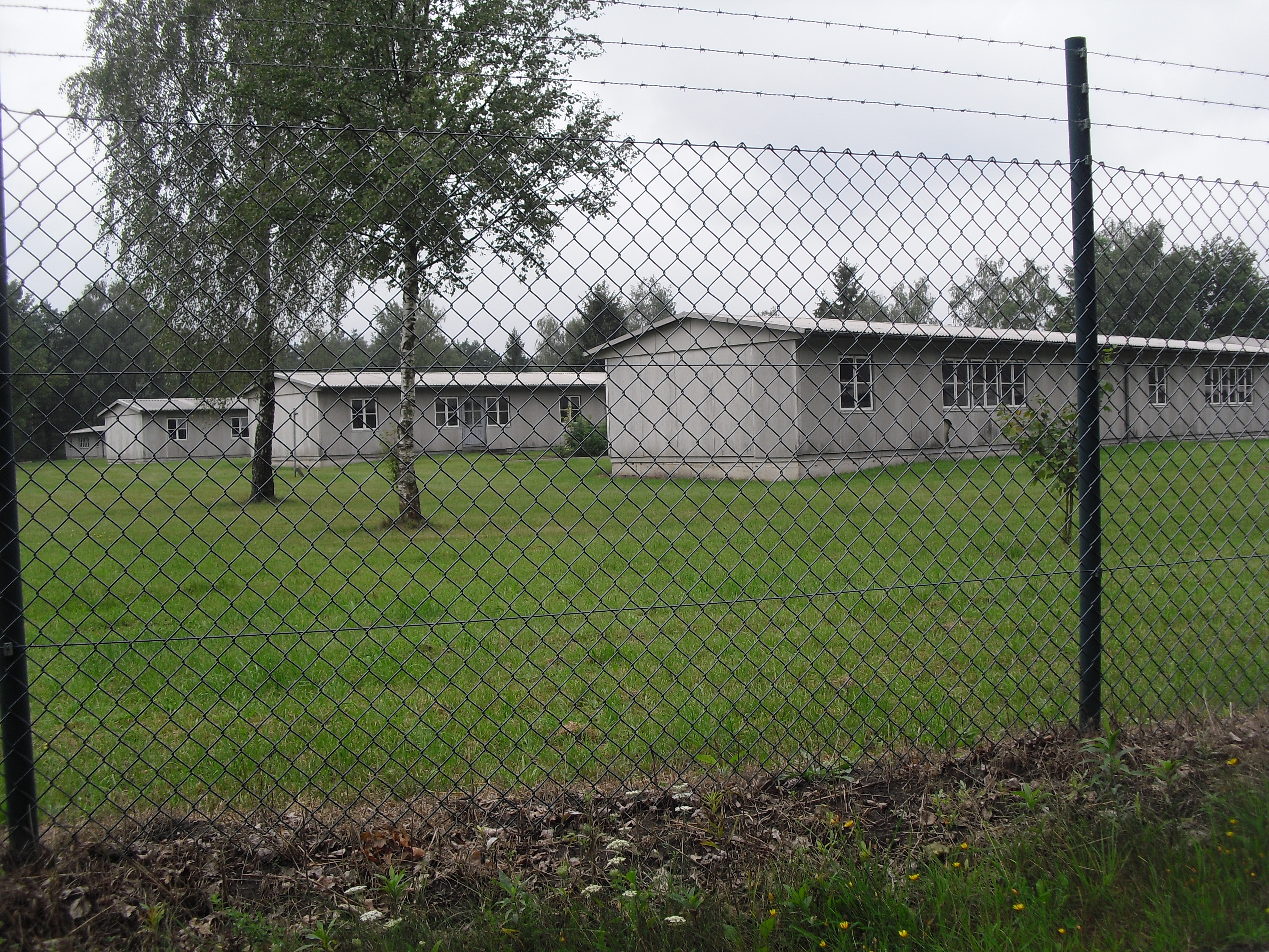 Militärbaracken auf dem Truppenübungsplatz Senne in Staumühle. Von 2015 bis 2017 wurden hier bis zu 800 Flüchtlinge untergebracht.